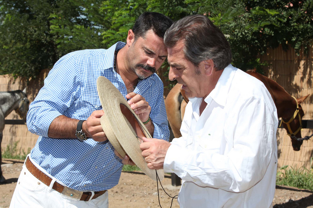 Nuestro candidato fue invitado a la casa del rostro de TVN.